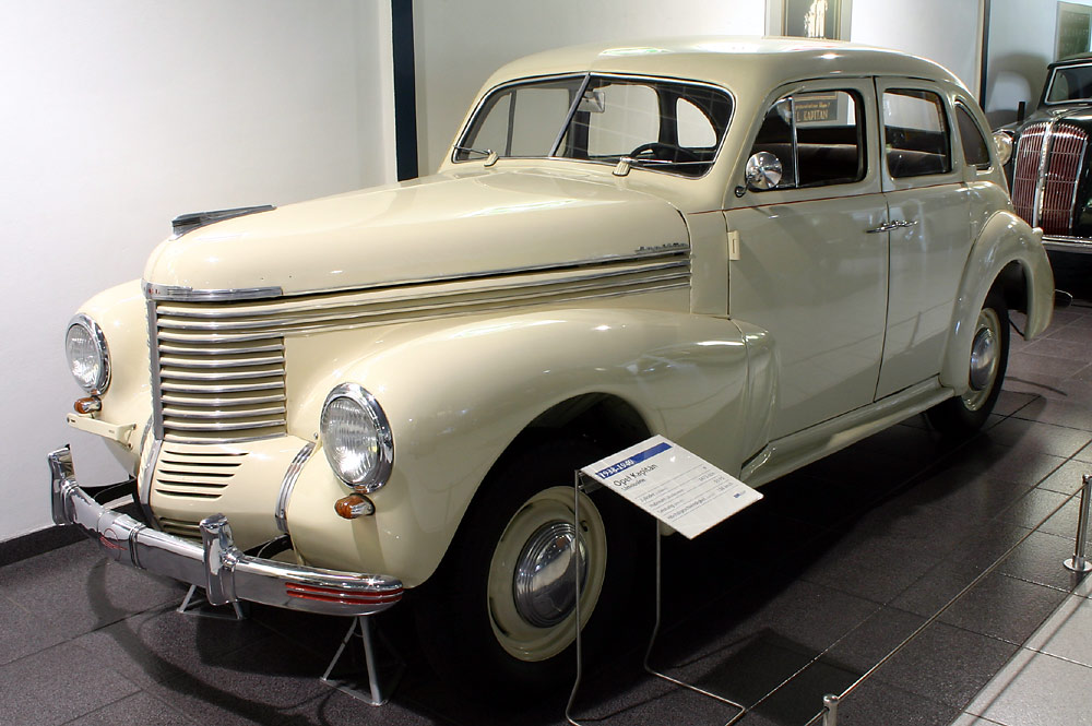 Opel Kapitän (1938) fotografiert von Softeis